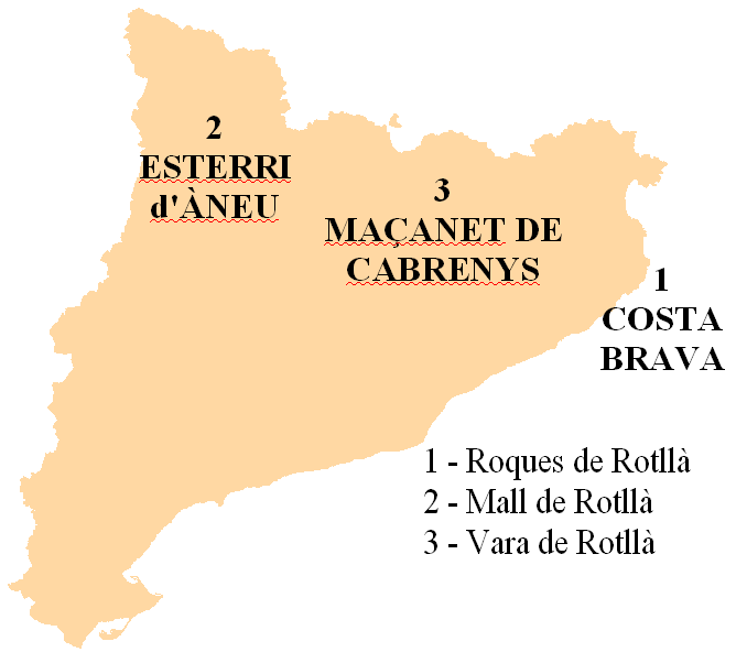 Autor: Llull Llicència: sense restriccions per al seu ús.